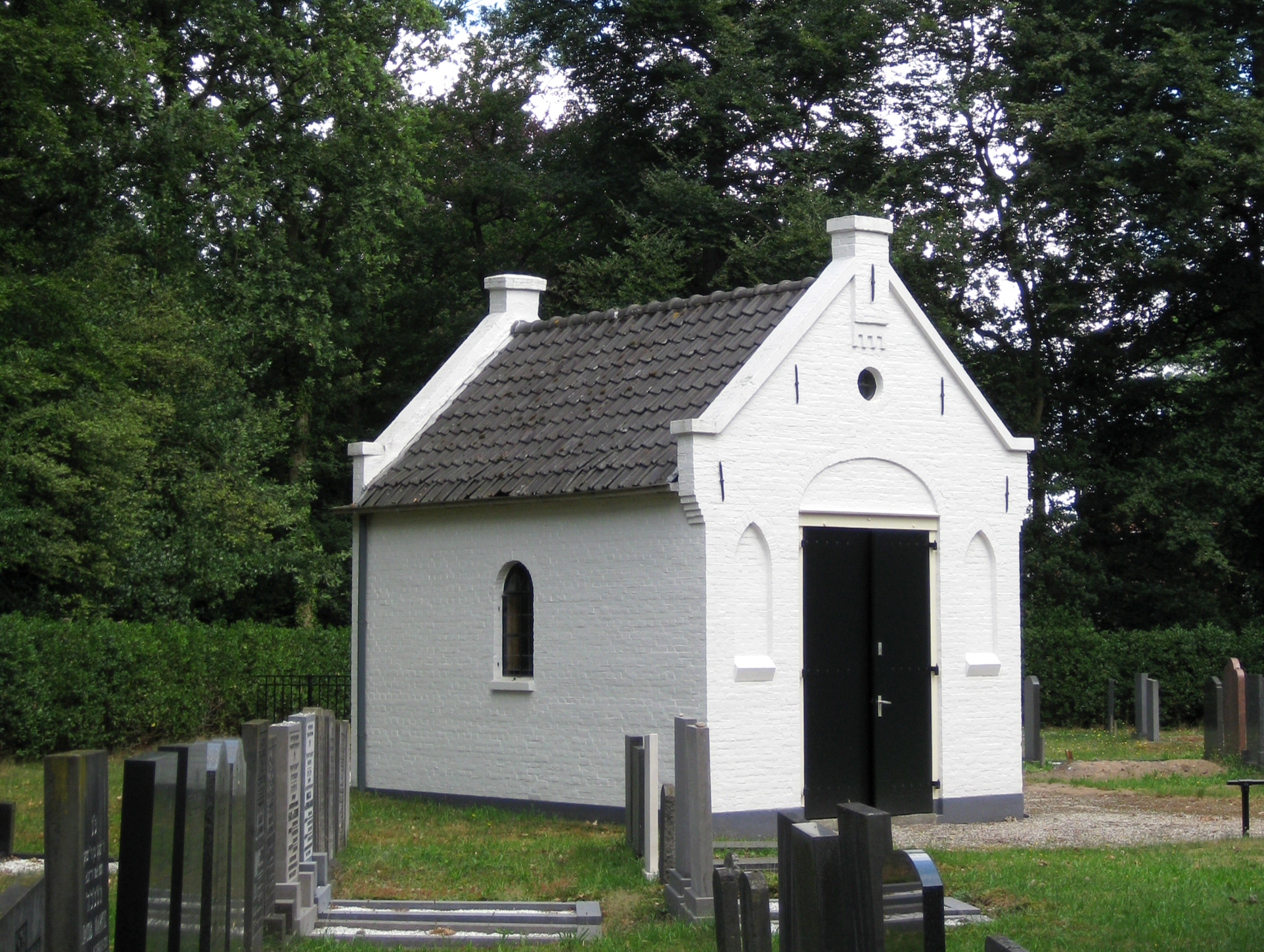 Baarhuisje, behorende tot het complex "Joodse Begraafplaats Amersfoortsestraatweg". Bussum, Amersfoortsestraatweg